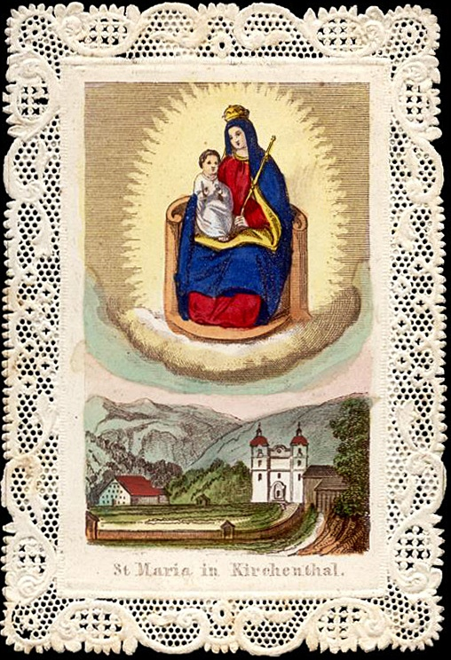 Wallfahrt Maria Kirchenthal, Österreich, Wallfahrtsandenken um 1860